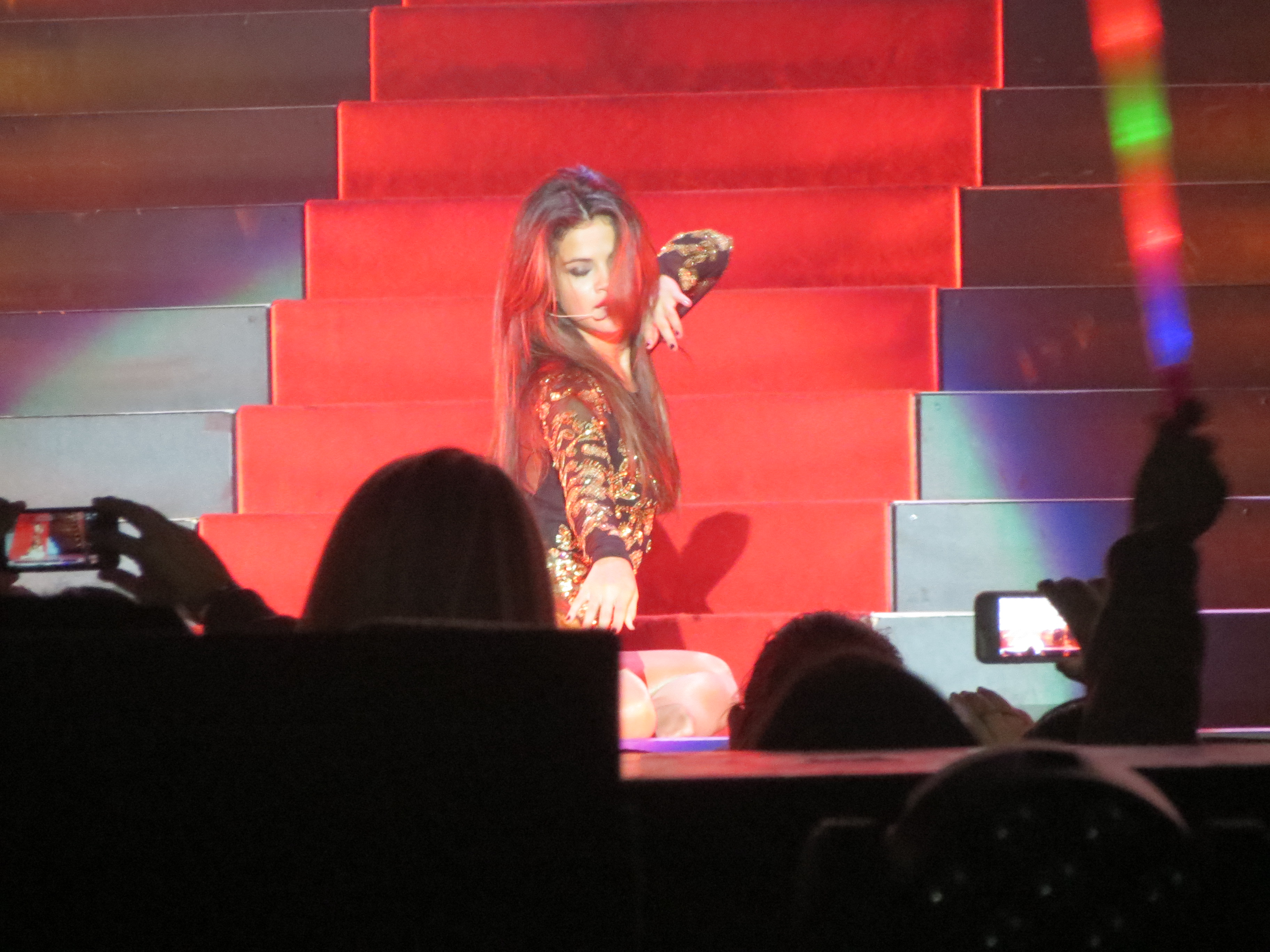 Selena Gomez StarsDance Nov 2013 San Diego, CA